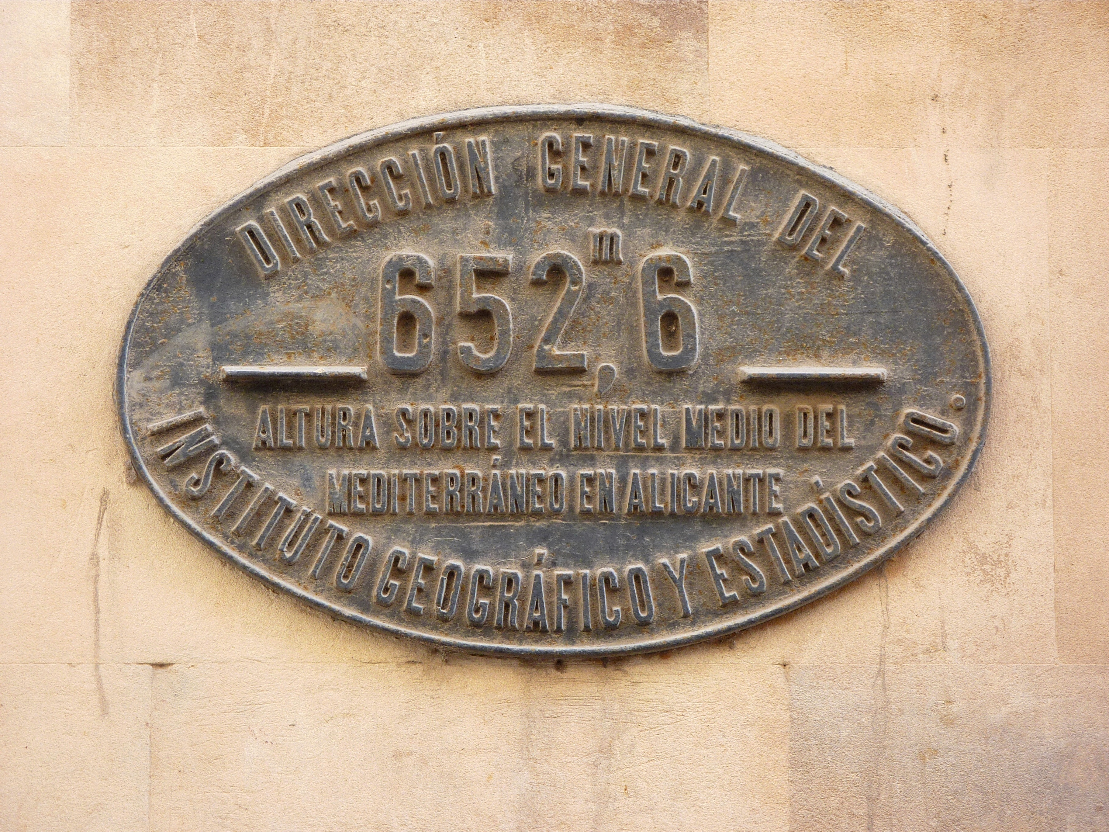 Placa de altitud de Zamora, España.